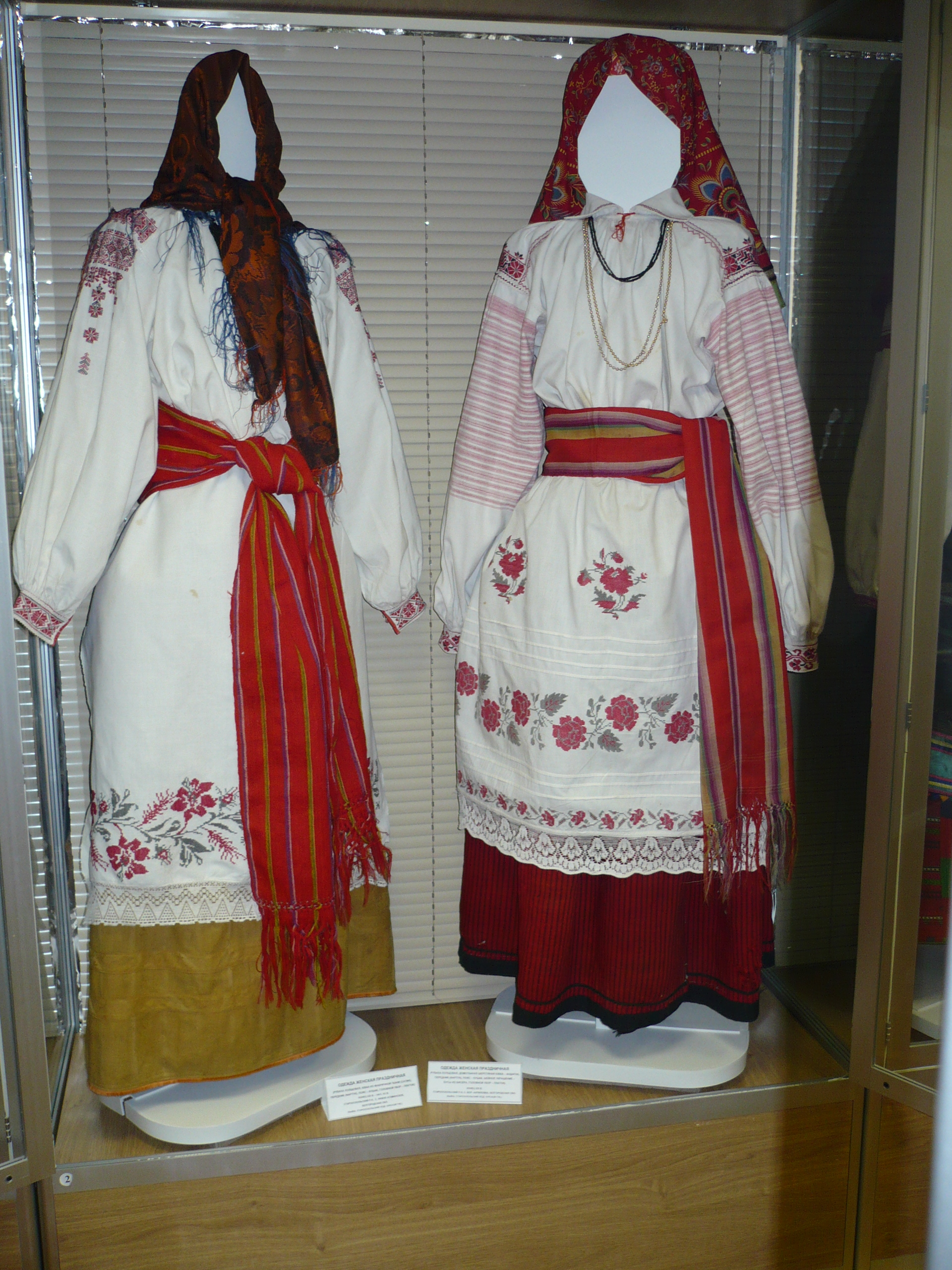 Старооскольский народный костюм. Стенд Б.